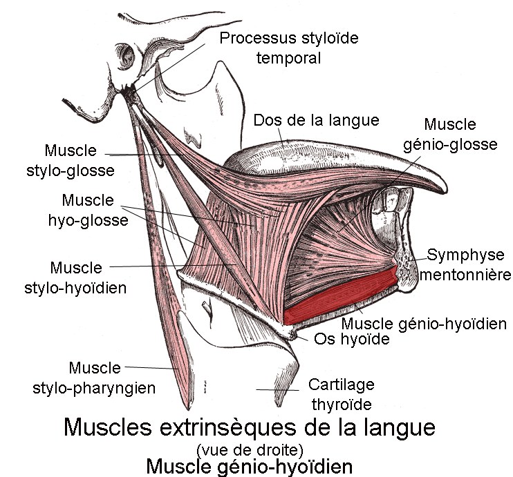 Muscle génio-hyoïdien. Anatomie humaine